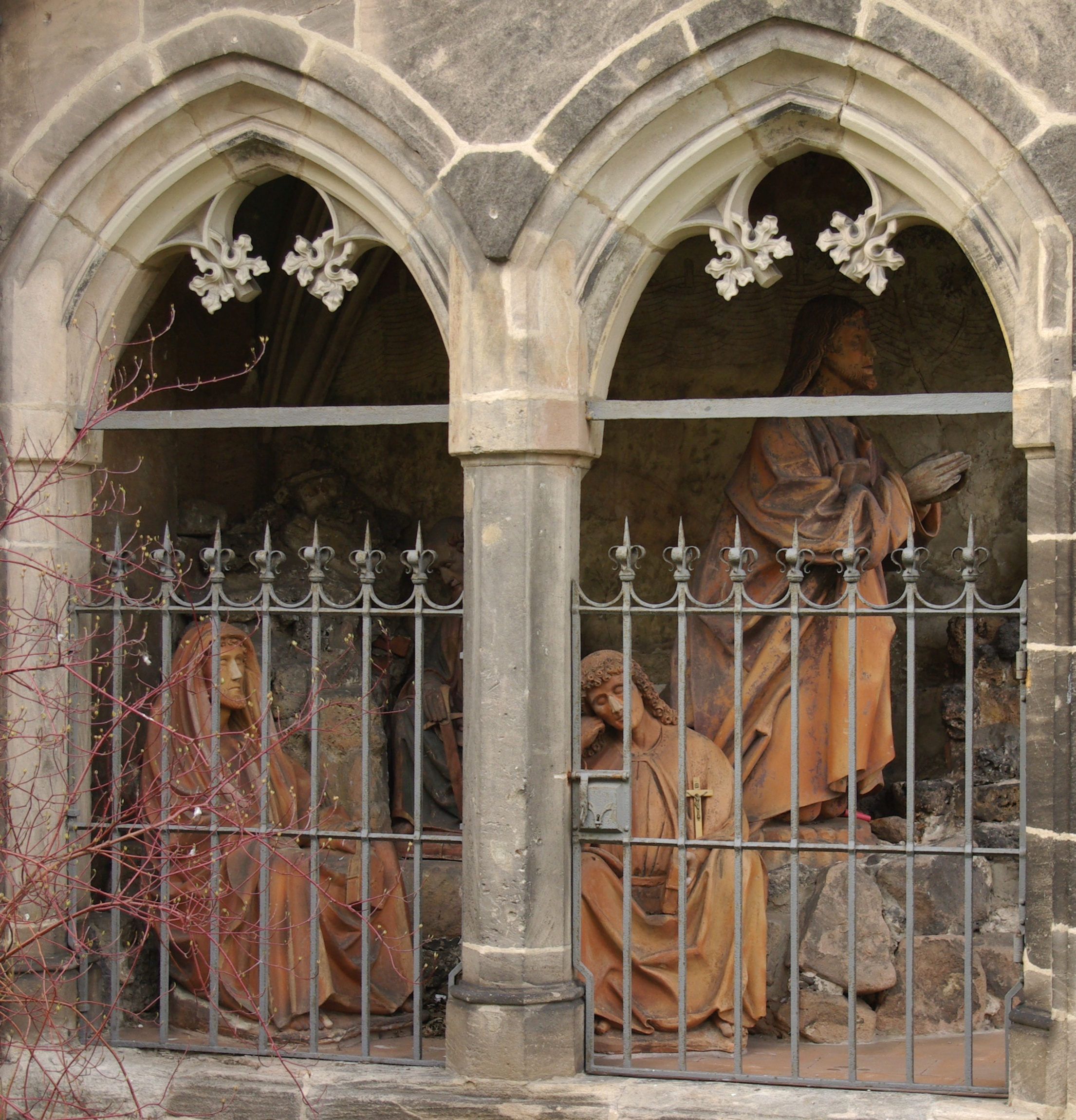 Der 1499 entstandene Ölberg an der südlichen Turmseite der Evangelischen Kirche St. Peter und Paul im Erlanger Stadtteil Bruck. Die vier lebensgroßen Figuren stellen den knieenden Christus und die schlafenden Jünger Petrus, Johannes und Jacobus in einer angedeuteten Landschaft dar. Die gesamte Szene ist in einen von Spitzbogenarkaden umgrenzten Anbau eingesetzt.